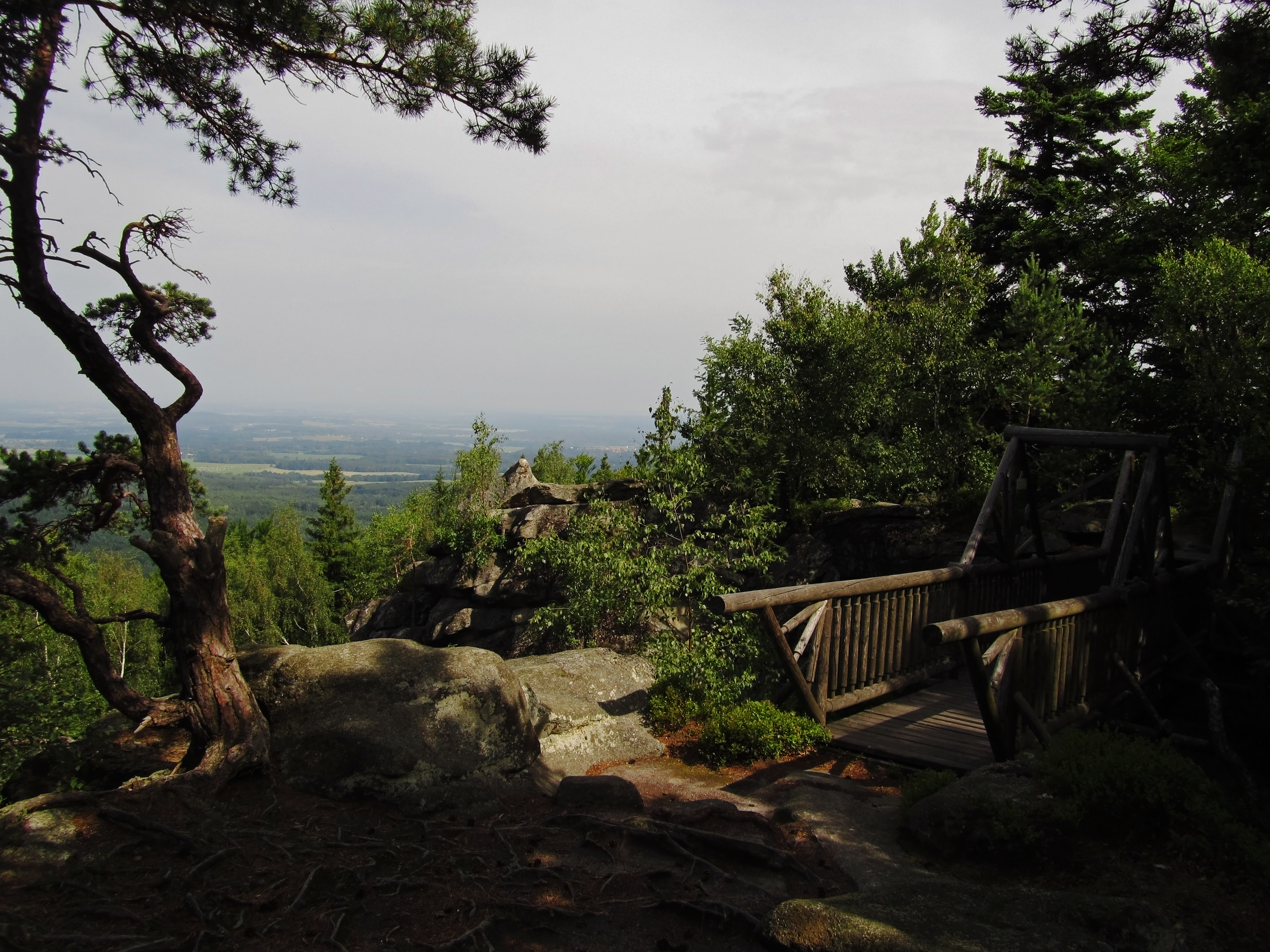 Gipfel des Mandlsteins